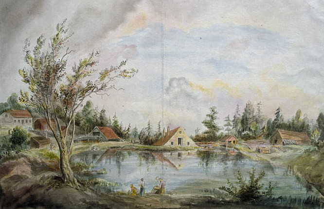 Vy över Länna bruk i Södermanland på 1790-talet. Akvarellerad pennteckning av Elias Martin.